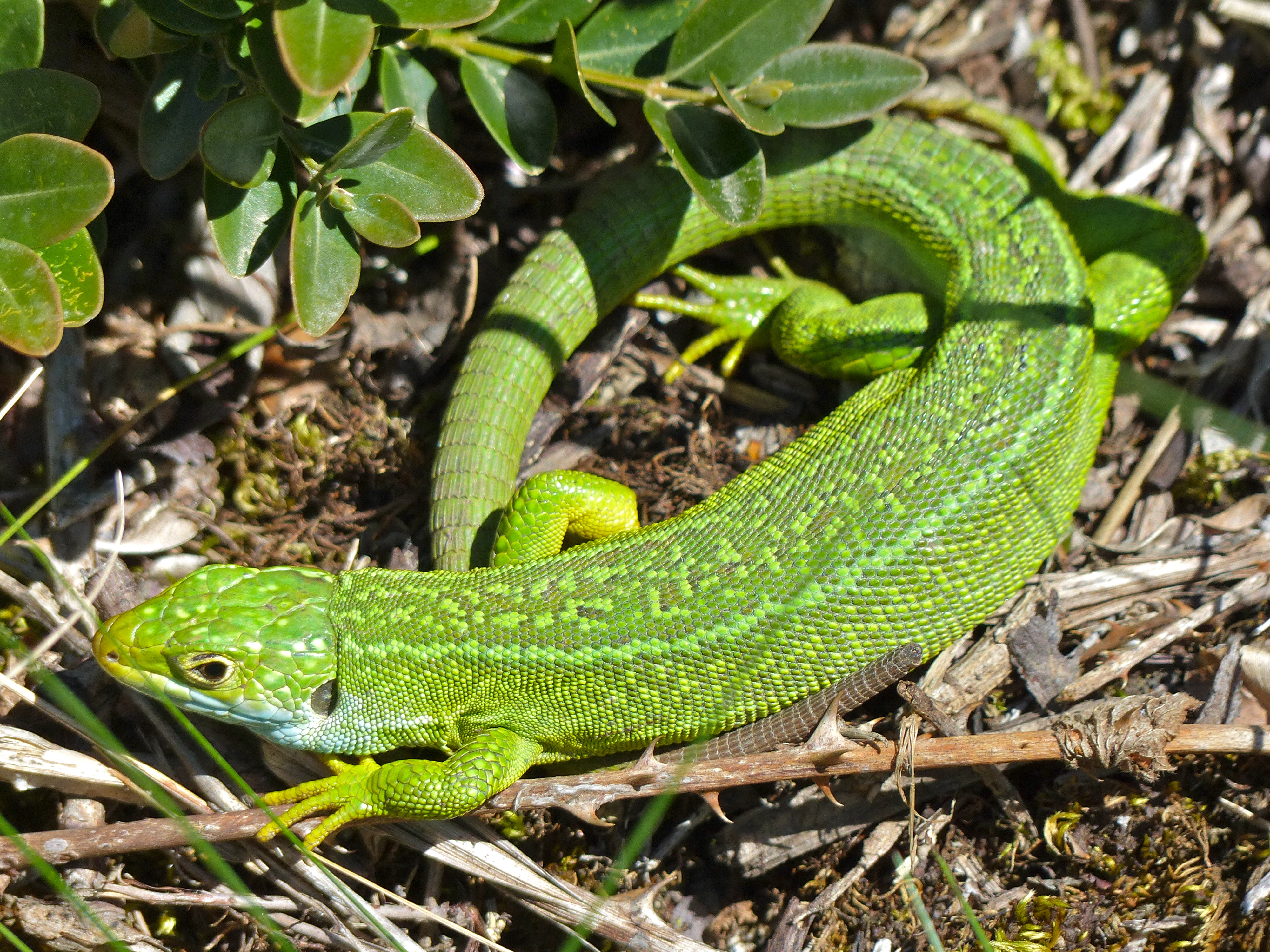 La Vacquerie-St Martin-de-Castries, Hérault, FRANCE